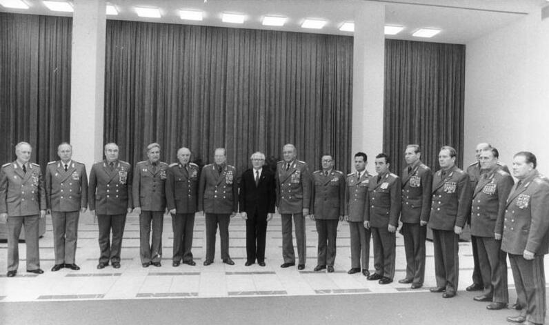 ADN-ZB/Mittelstädt/20.10.83 Berlin: Der Generalsekretär des ZK der SED, Erich Honecker, Vorsitzender des Staatsrates und des Nationalen Verteidigungsrates der DDR, empfing in Berlin die Mitglieder des Komitees der Verteidigungsminister der Teilnehmerstaaten des Warschauer Vertrages und weitere führende Militärs der Vereinten Streitkräfte. v.l.n.r. Heinz Keßler, Fritz Streletz, Viktor Kulikow, Dobri Dshurow, Martin Dzur, Dmitri Ustinow, Erich Honecker, Heinz Hoffmann, Florian Siwicki, Constantin Olteanu, Lajos Czinege, Nikolai Ogarkow, Anatoli Gribkow, Miroslaw Zika (verdeckt), Wassili Petrow und Iwan Schawrow.